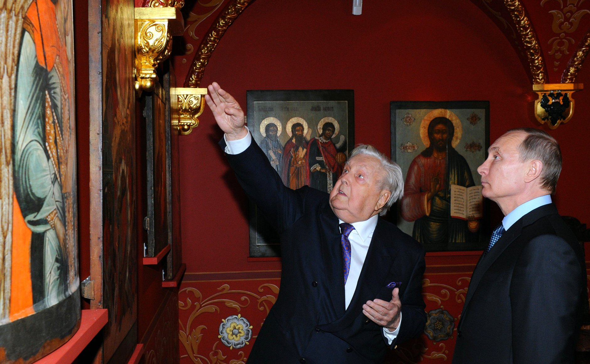 Владимир Путин во время посещения Музея сословий России. С народным художником СССР Ильёй Глазуновым